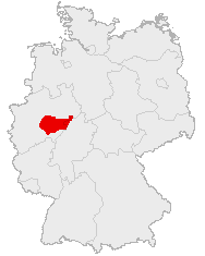 Die Lage des Sauerlandes in Deutschland